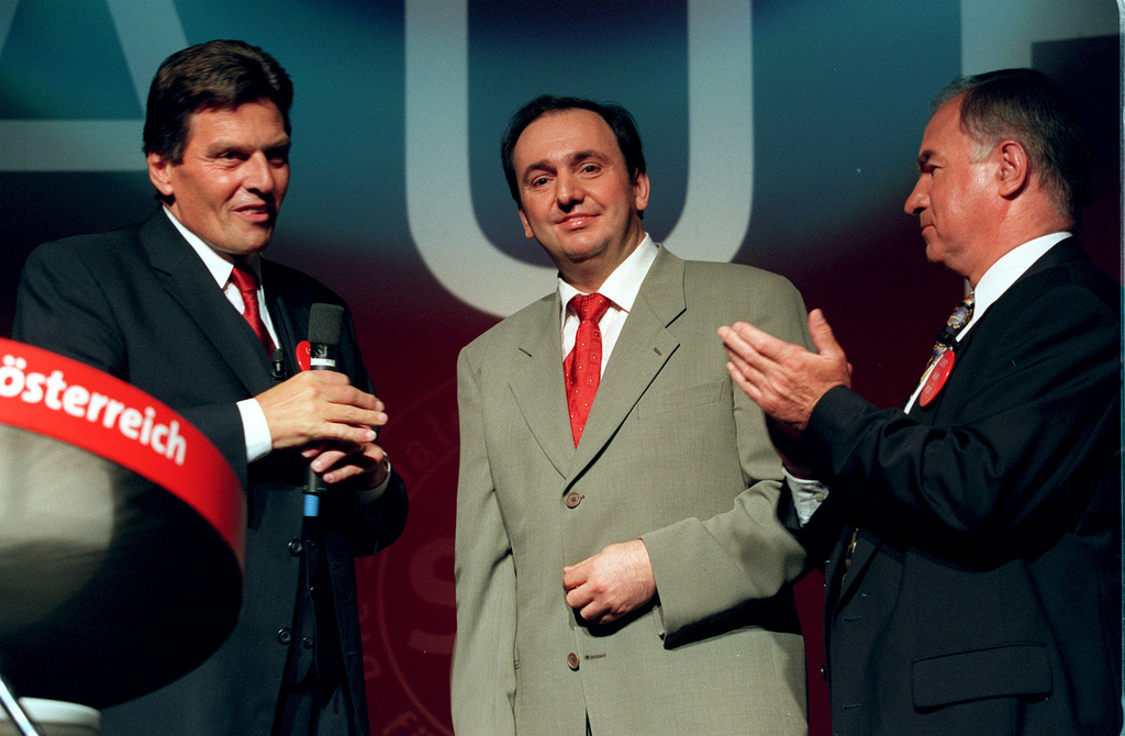 LHStv. Erich Haider - 10 Jahre Landesvorsitzender der SPÖ OÖ 10 Jahre Landesparteivorsitzender der SPÖ Oberösterreich, LHStv. Erich Haider. Im Bild Landesparteitag 1998mit Übergabe an der Landesparteispitze von LHStv. Fritz Hochmair (rechts) an LR. Erich Haider (mitte), links der damalige Bundeskanzler Viktor Klima.